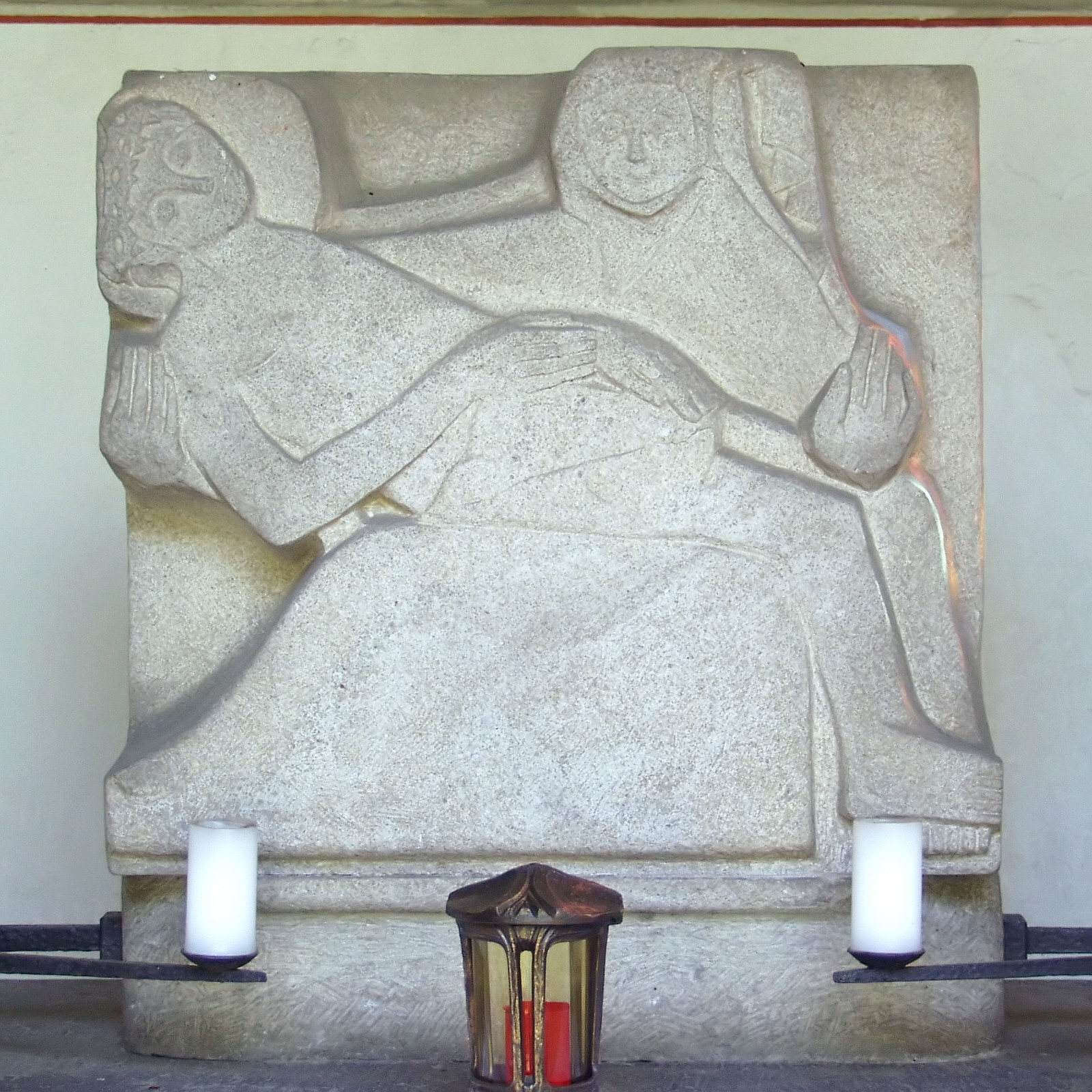 Günther Oellers: Pieta im Chor der alten Pfarrkirche Dattenberg